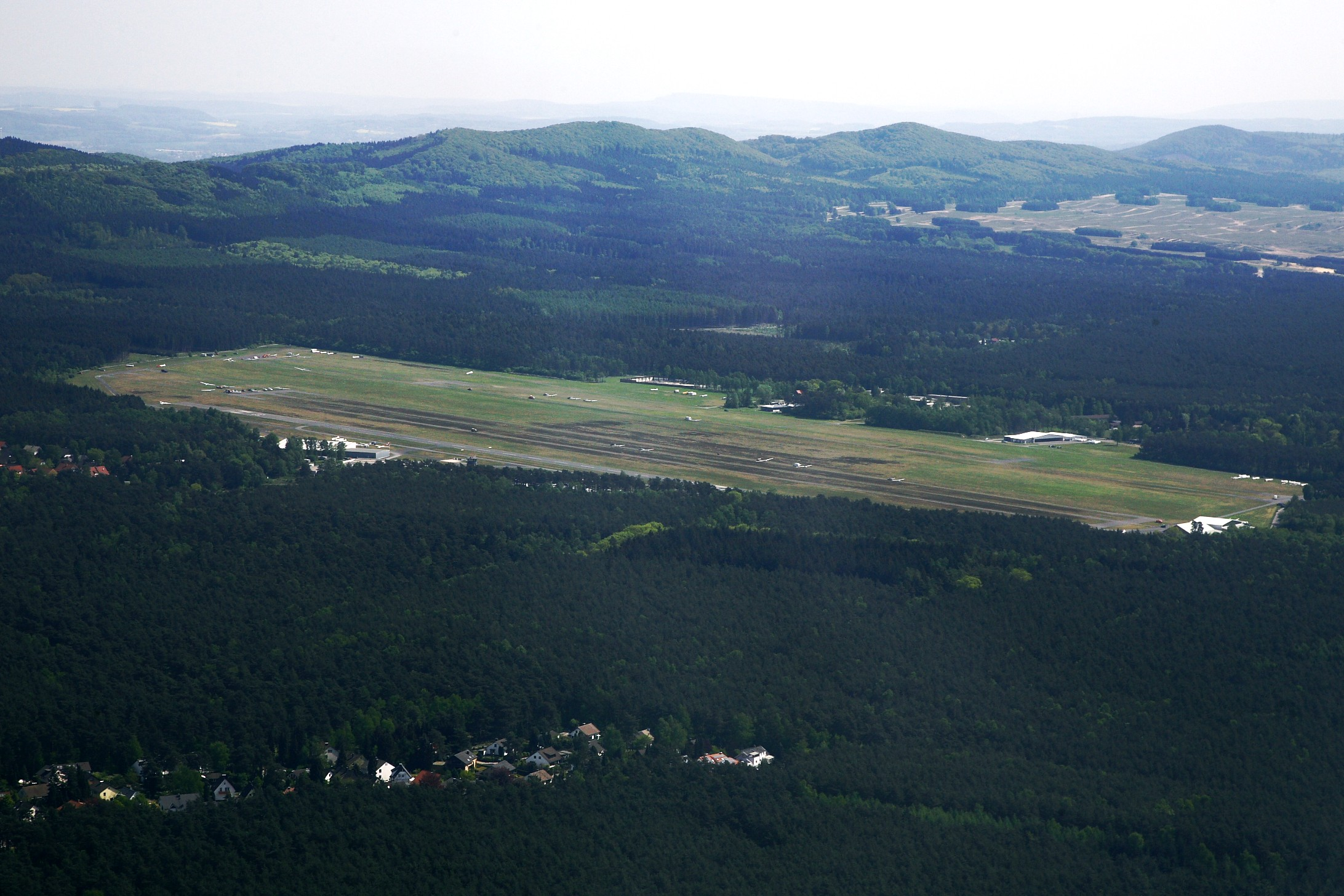 Flughafen Oerlinghausen